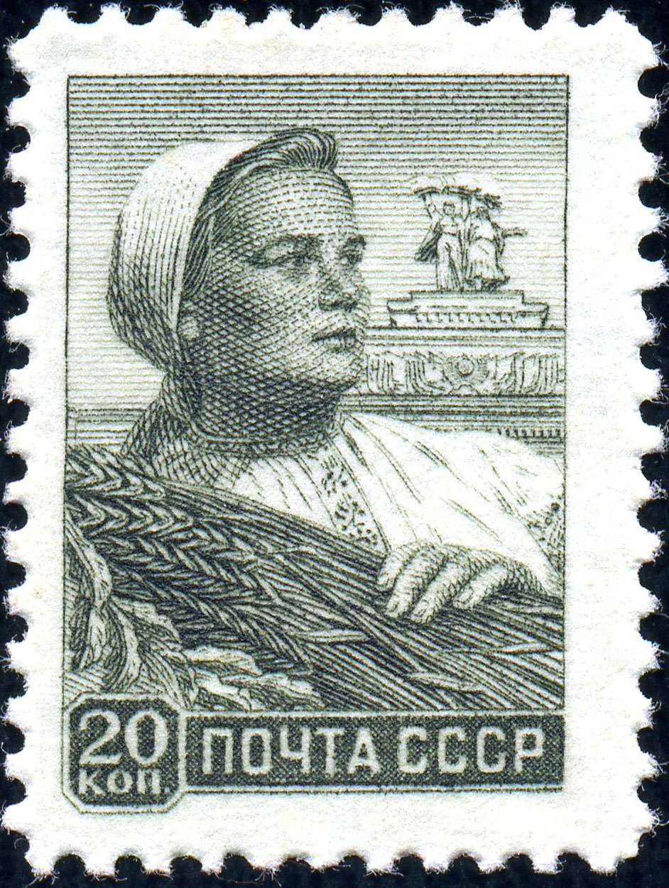 Марка СССР